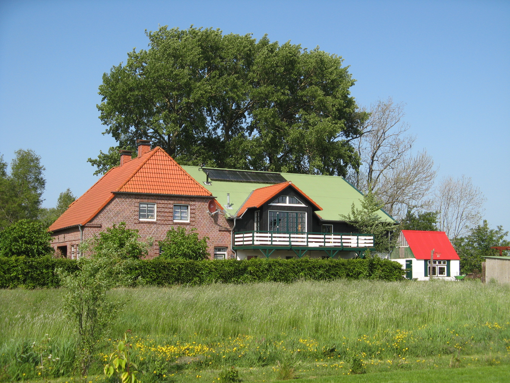 Epenwöhrden, Haus